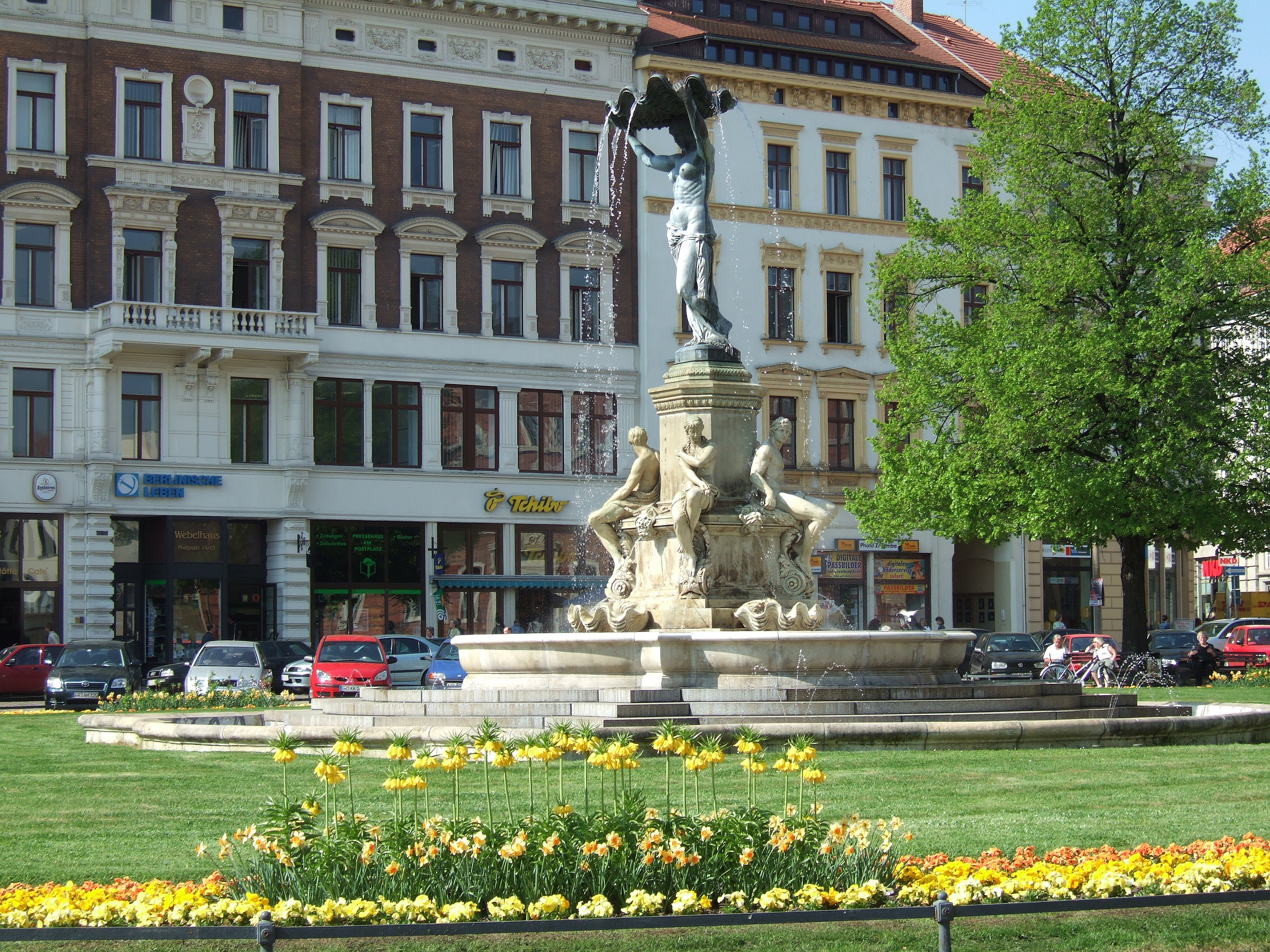 Bildbeschreibung: Muschelminna Brunnen auf dem Görlitzer Postplatz Quelle: selbst fotografiert Datum: 04.05.2006 Sonstiges: public domain